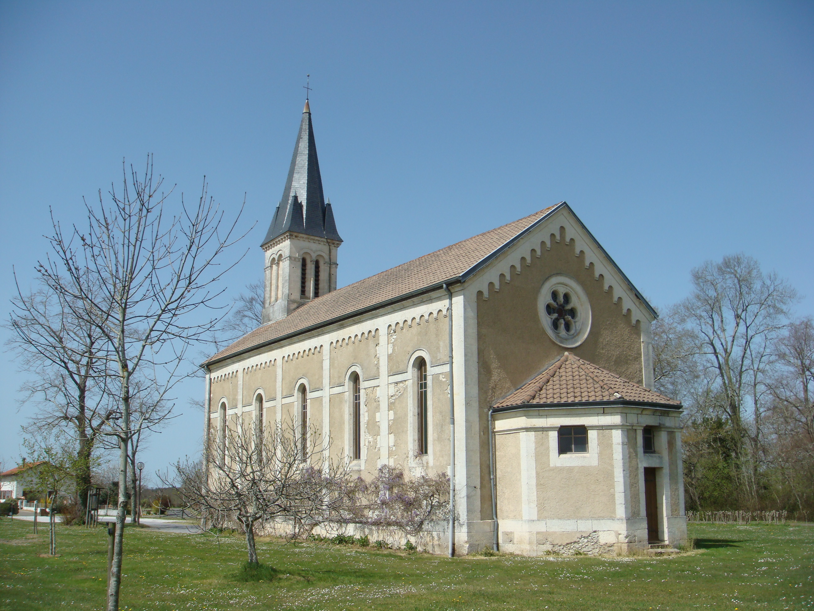 Église Sainte-Eulalie d'Angoumé